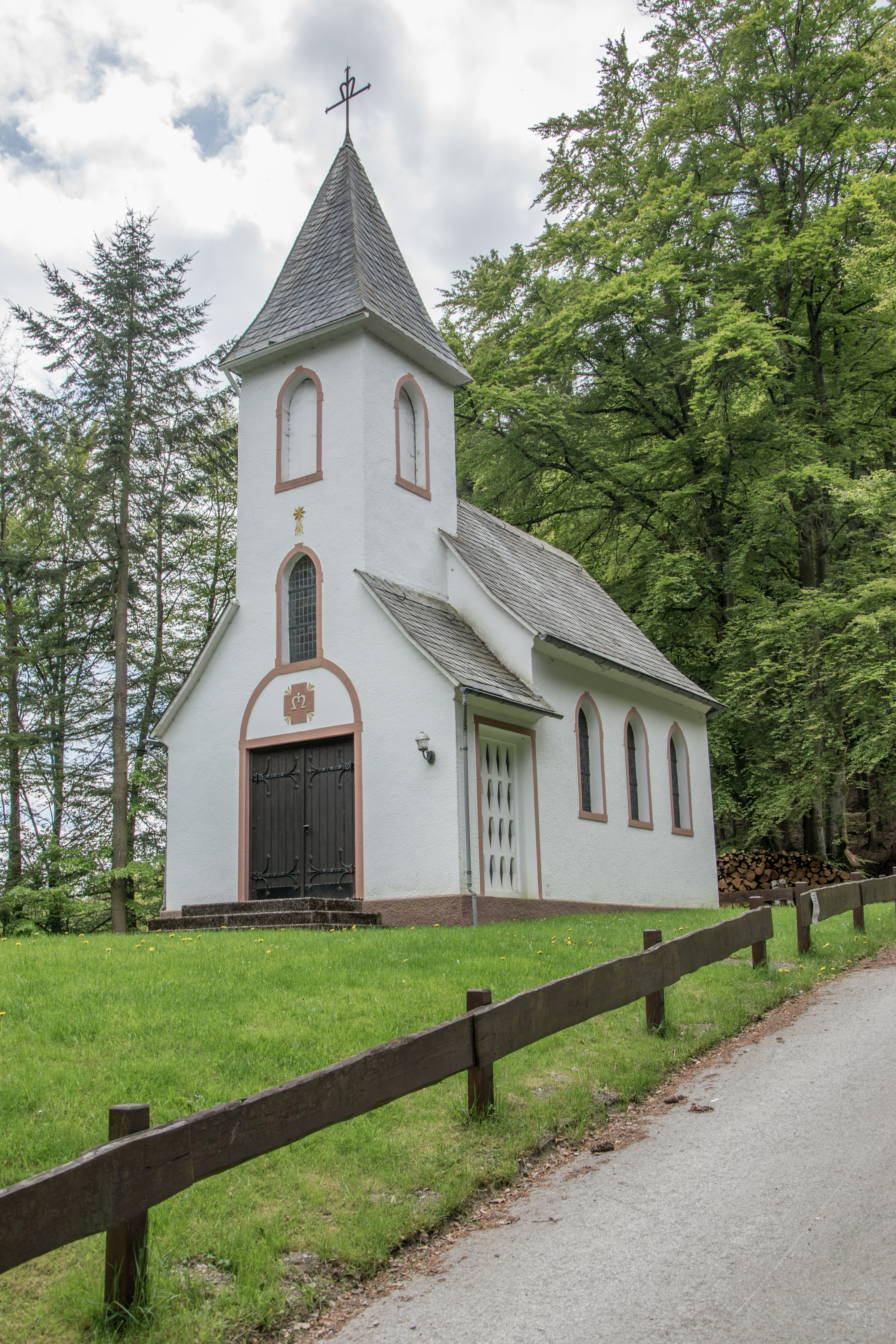 Bontkirchen Kapelle St. Maria von Norden